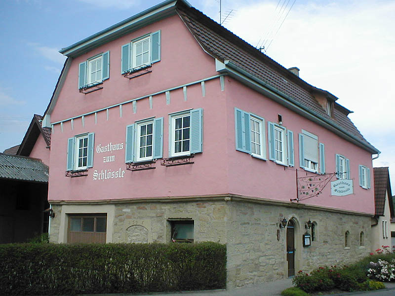 Neues Schlösschen in Zaberfeld-Michelbach, erbaut 1709 auf älteren Fundamenten, heute Gaststätte